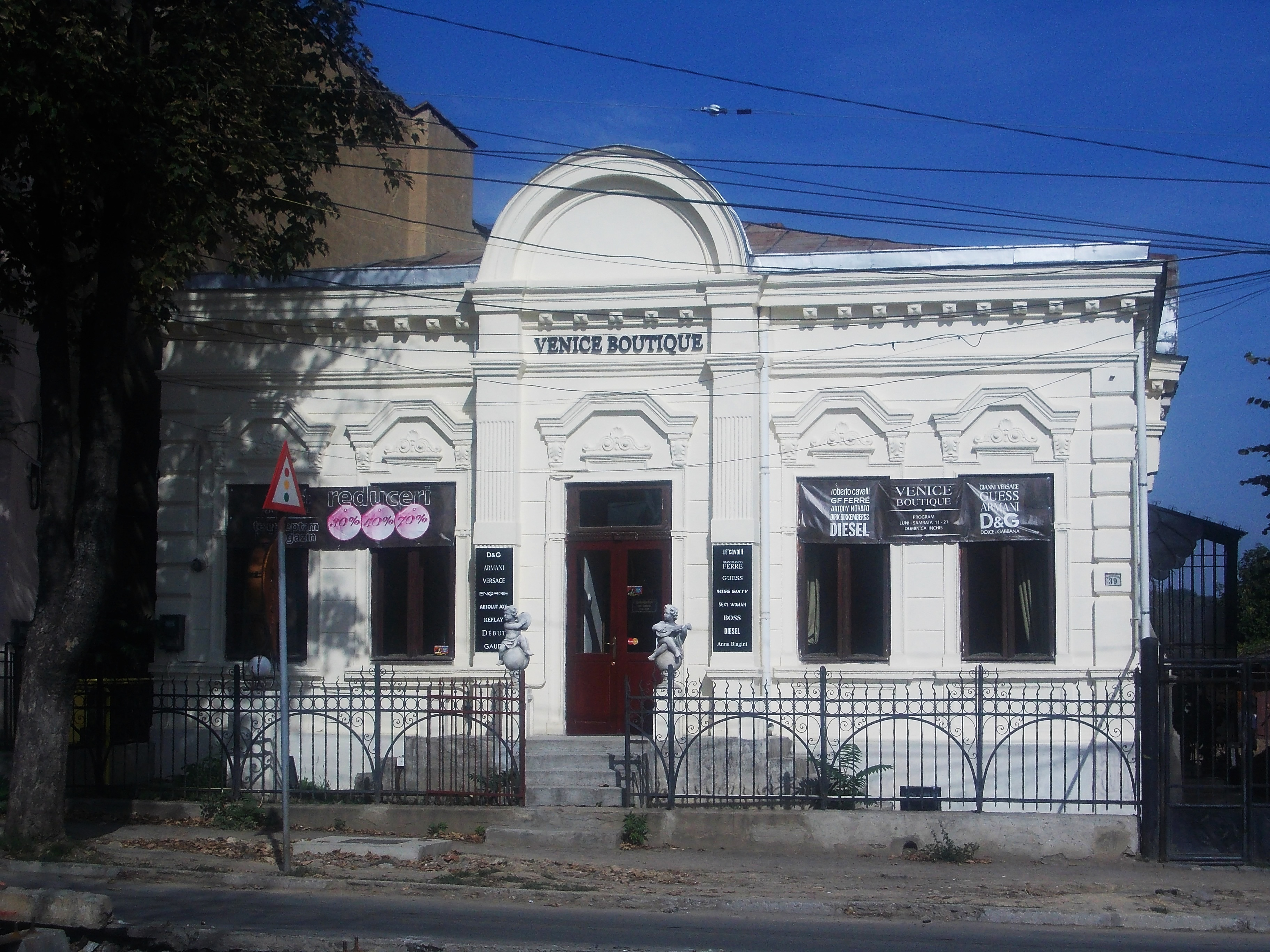 municipiul Iași, Str. Elena Doamna 39